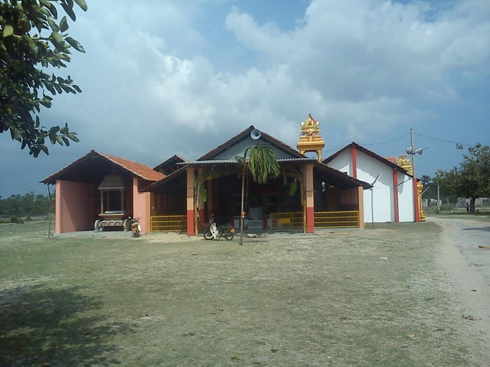 முன் தோற்றம்